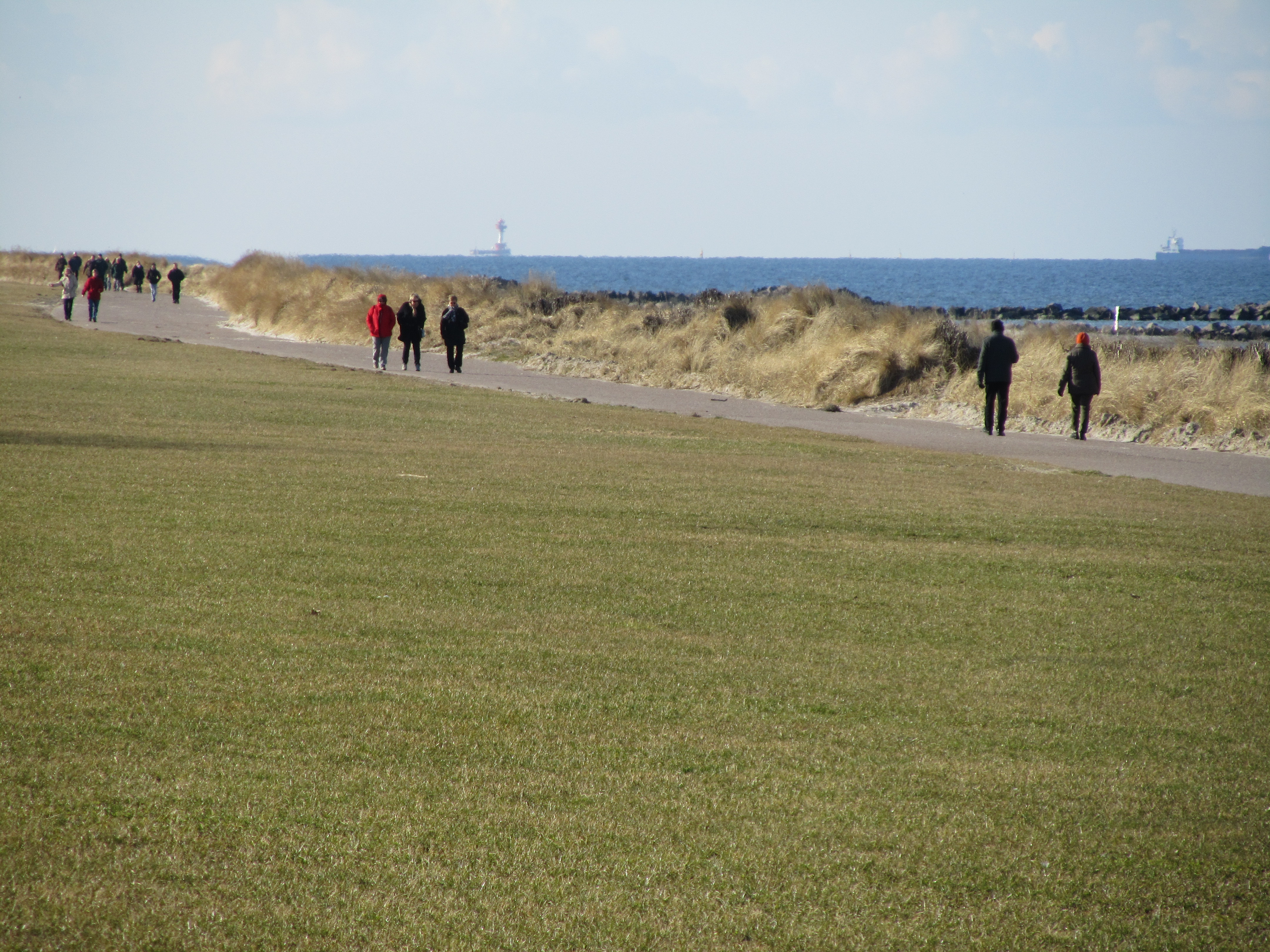 Deich von Schönberger Strand mit Dünen, Blick Richtung Westen auf die Kieler Bucht. Im Hintergrund Leuchtturm Kiel.